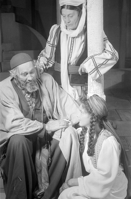 Original image description from the Deutsche FotothekPaul Wegener in der Titelrolle, Agathe Poschmann als Recha, Kai Möller als Sultan Saladin und Eduard von Winterstein als Klosterbruder